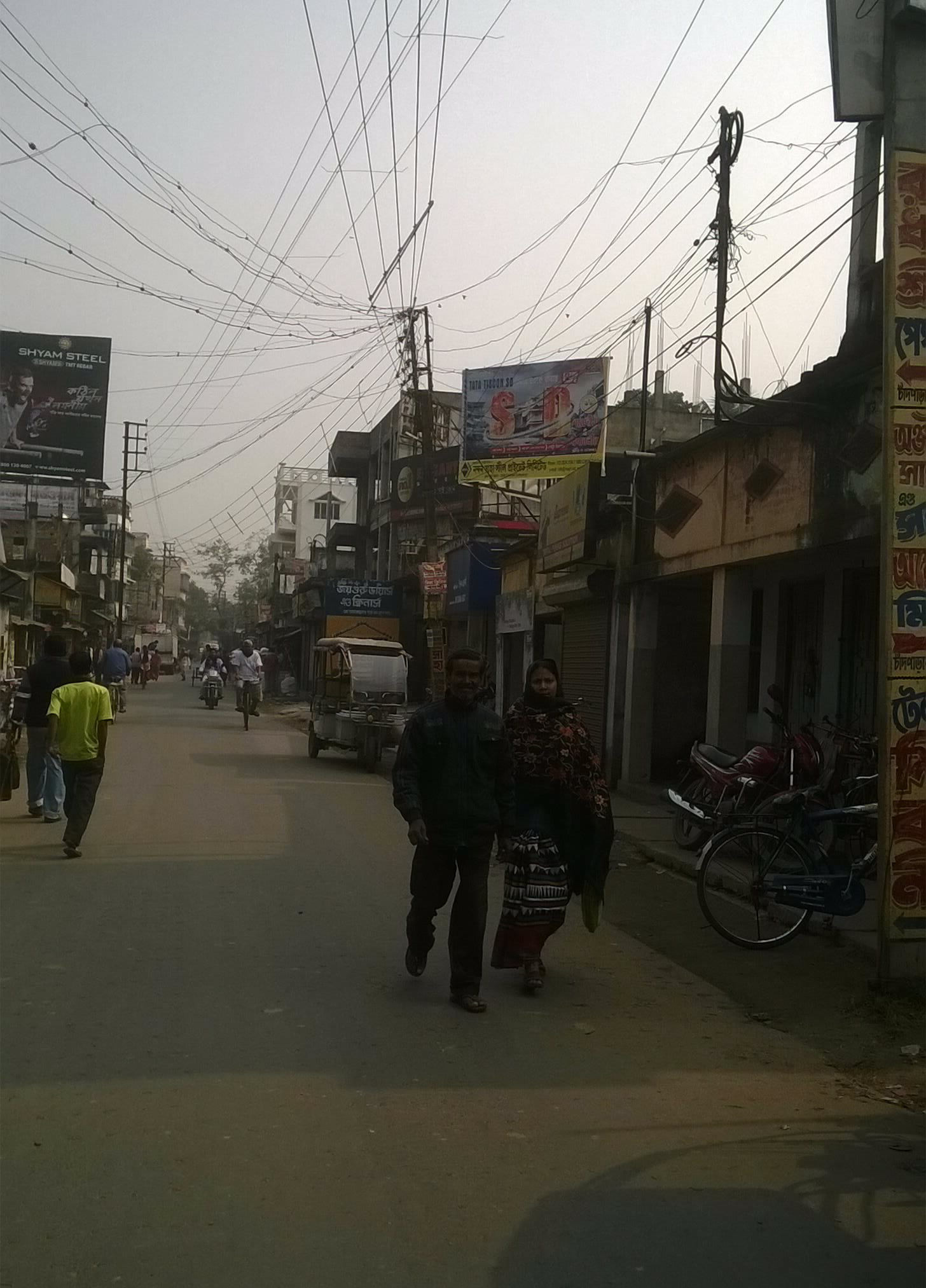 Chandpara Bazar, Jhaudanga Road. চাঁদপাড়ার বাজার,, ঝাউডাঙা রোড।